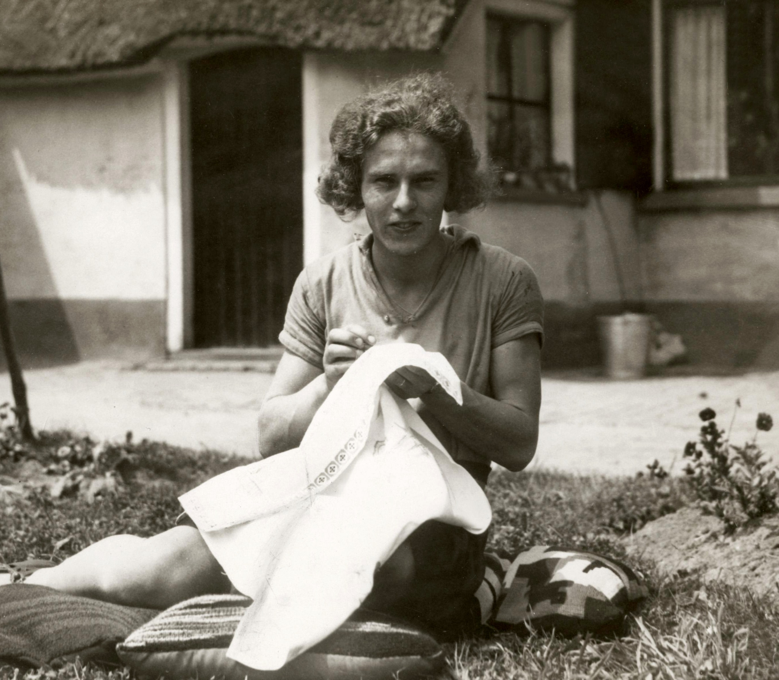 Tollina Wilhelmina (Tollien) Schuurman [1913-1994] Nederlands atlete. Gold in de jaren '30 als een van de snelste vrouwen ter wereld. Foto uit 1932 : een bordurende Tollien in haar tuin voor haar huis. Plaats onbekend.